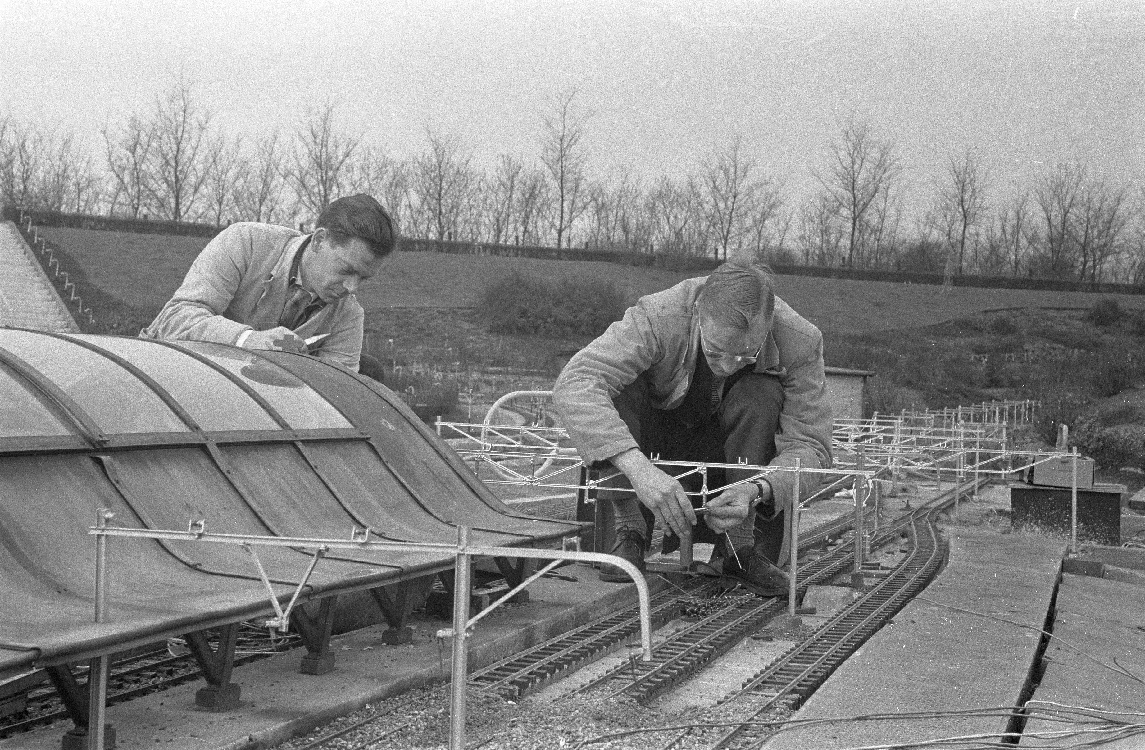 Collectie / Archief : Fotocollectie Anefo Reportage / Serie : [ onbekend ] Beschrijving : Opknappen van "Madurodam" voor de aanstaande opening op 6 april aanstaande Datum : 1 maart 1960 Locatie : Den Haag Trefwoorden : attractieparken Fotograaf : Pot, Harry / Anefo Auteursrechthebbende : Nationaal Archief Materiaalsoort : Negatief (zwart/wit) Nummer archiefinventaris : bekijk toegang 2.24.01.05 Bestanddeelnummer : 911-0589